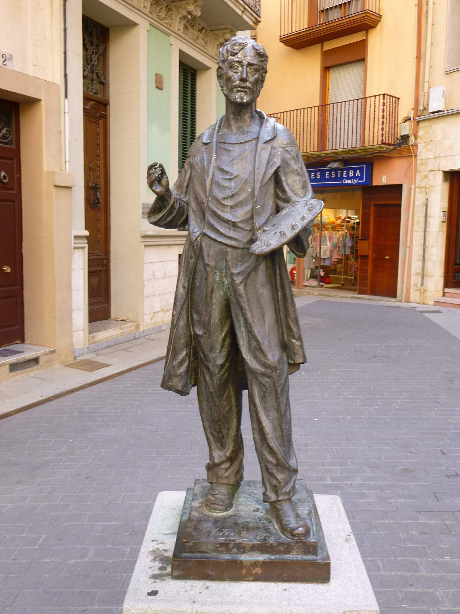 Olot (Girona)